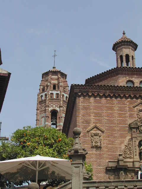 D'Spuenescht Duerf (Poble Espanyol) zu Barcelona